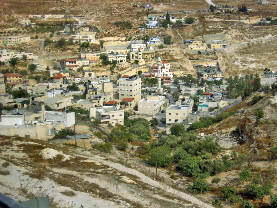 Jabbel mukkabar in Jerusalem